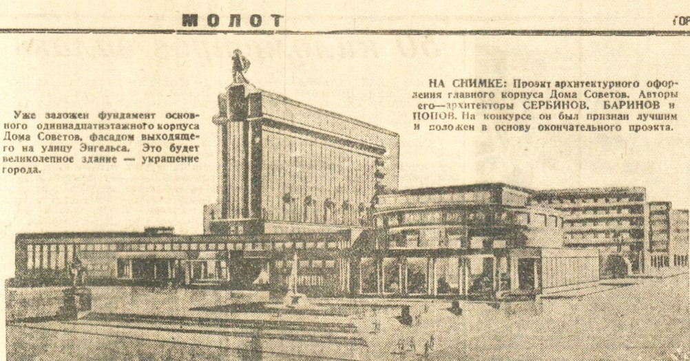 Дом советов в Ростове-на-Дону, иллюстрация из статьи газеты Молот